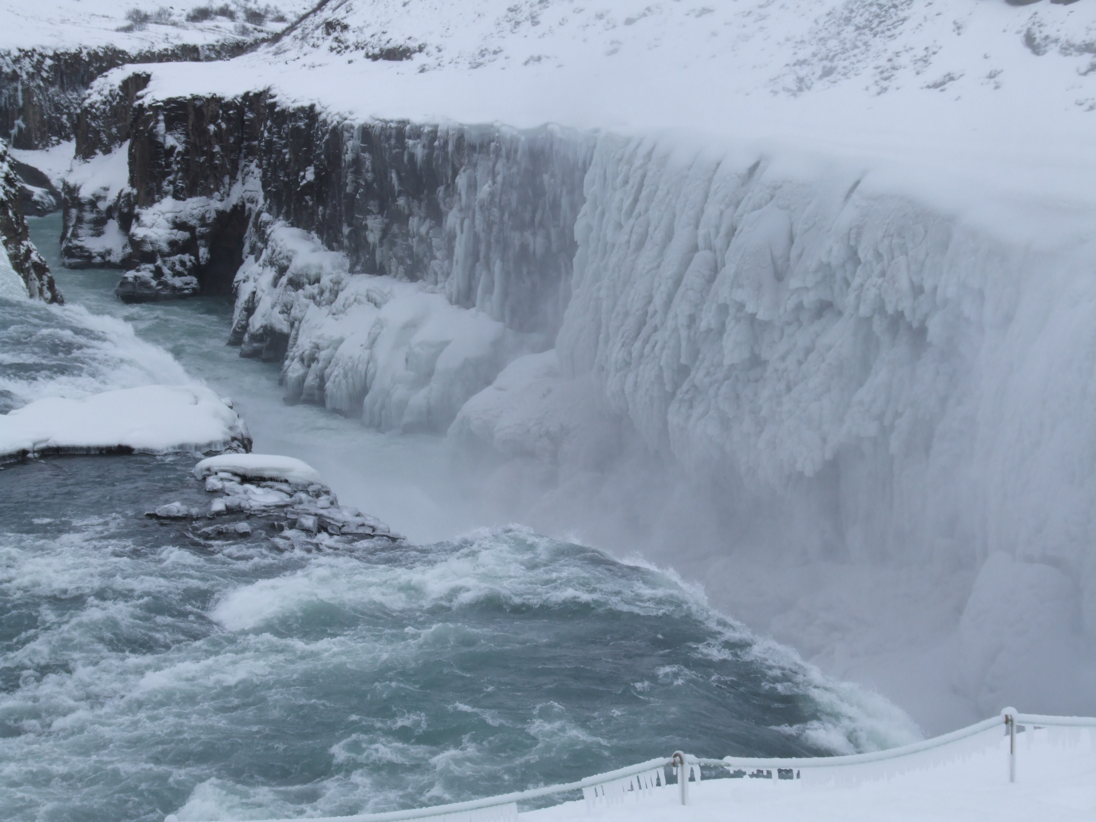 Blick auf die untere Hälfte des Gullfoss am 23.2.2008, der hier in die Schlucht stürzt. Gegenüber haben sich Wassertropfen als massive Eiswände niedergeschlagen. en: Gullfoss, February 2008, Iceland